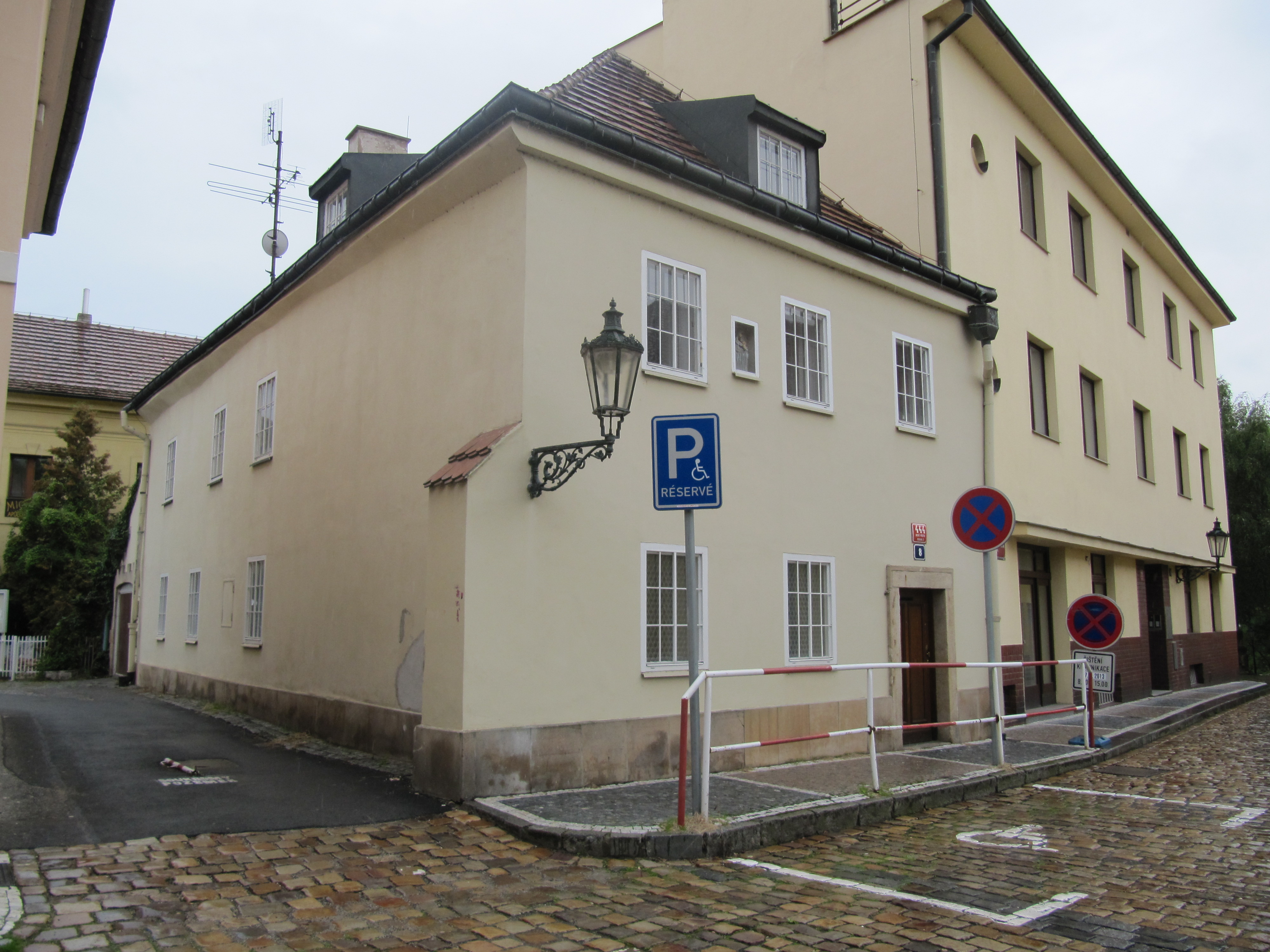 Měšťanský dům (Nové Město), Praha 2-Nové Město, Apolinářská 444/8